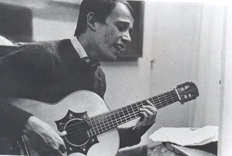 Silvio Rodríguez en 1968. Revista Cuba. Proporcionada con el permiso de Silvio Rodríguez.